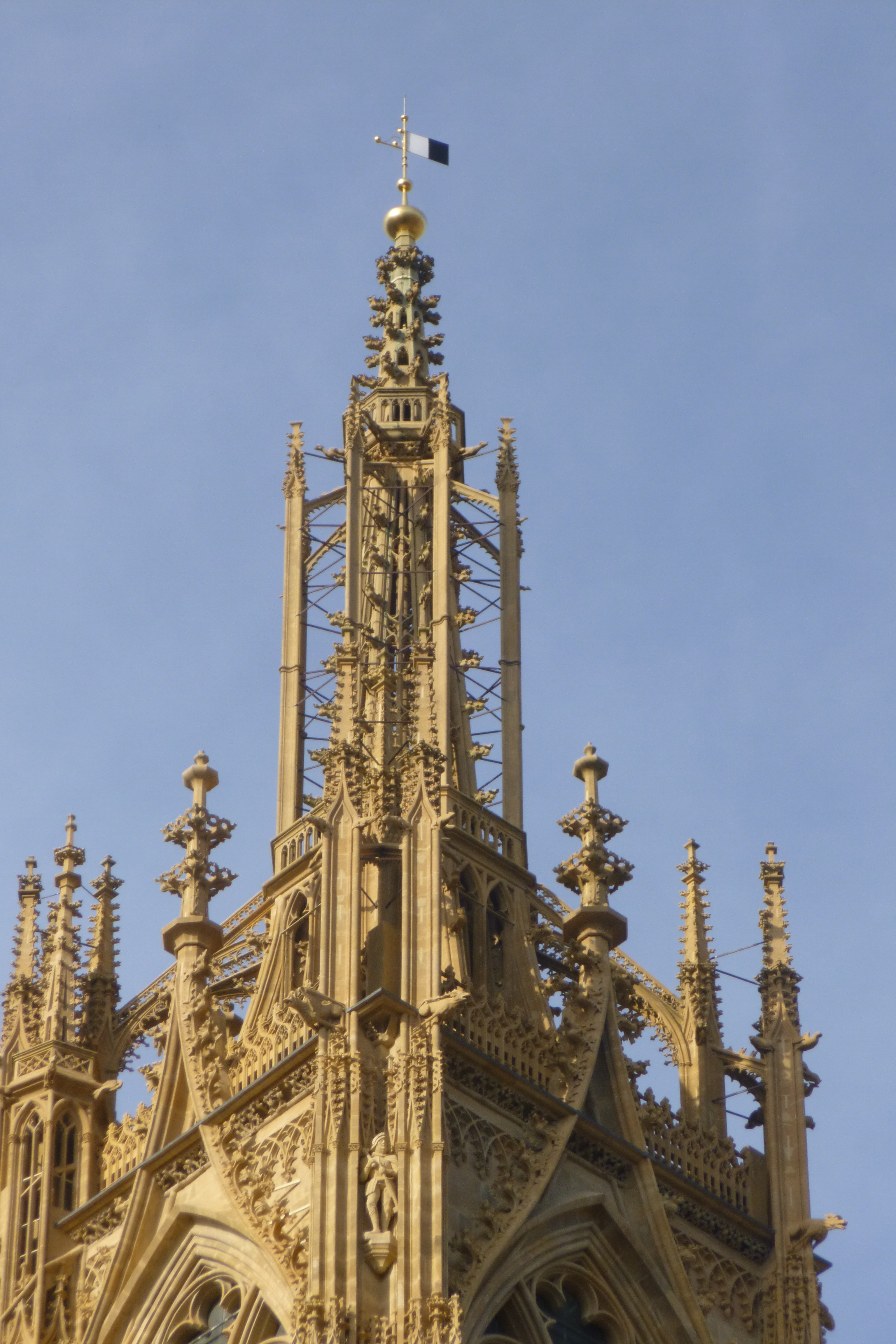 Tour méridionale de la cathédrale de Metz, surnommée tour de la Mutte. Sommet avec flèche et drapeau municipal.